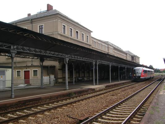 Bahnsteig 1 im Bahnhof Bautzen.